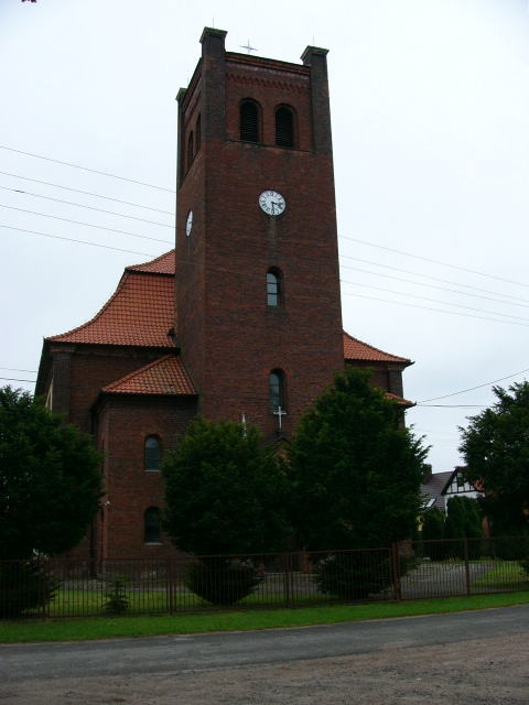 Piskorzyna - kościół parafialny p.w. Niepokalanego Serca NMP